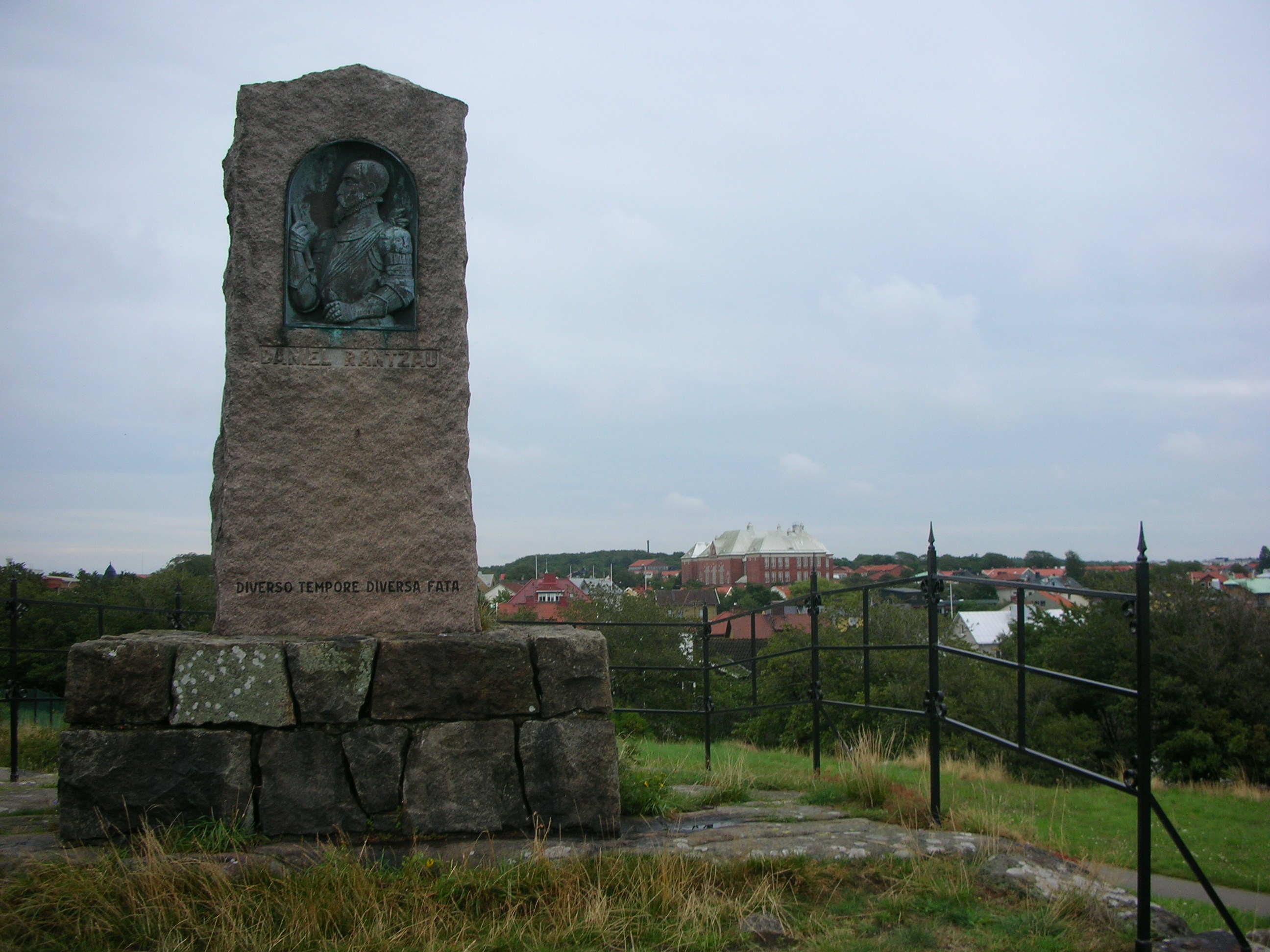 Monumentet över Daniel Rantzau på Rantzauklippan i Varberg.